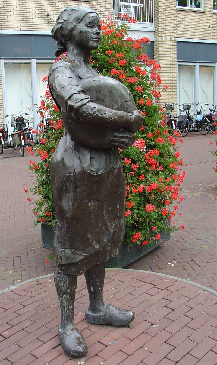 De kaasboerin (brons, 1988) door Ineke van Dijk - Nieuwe Markt Gouda